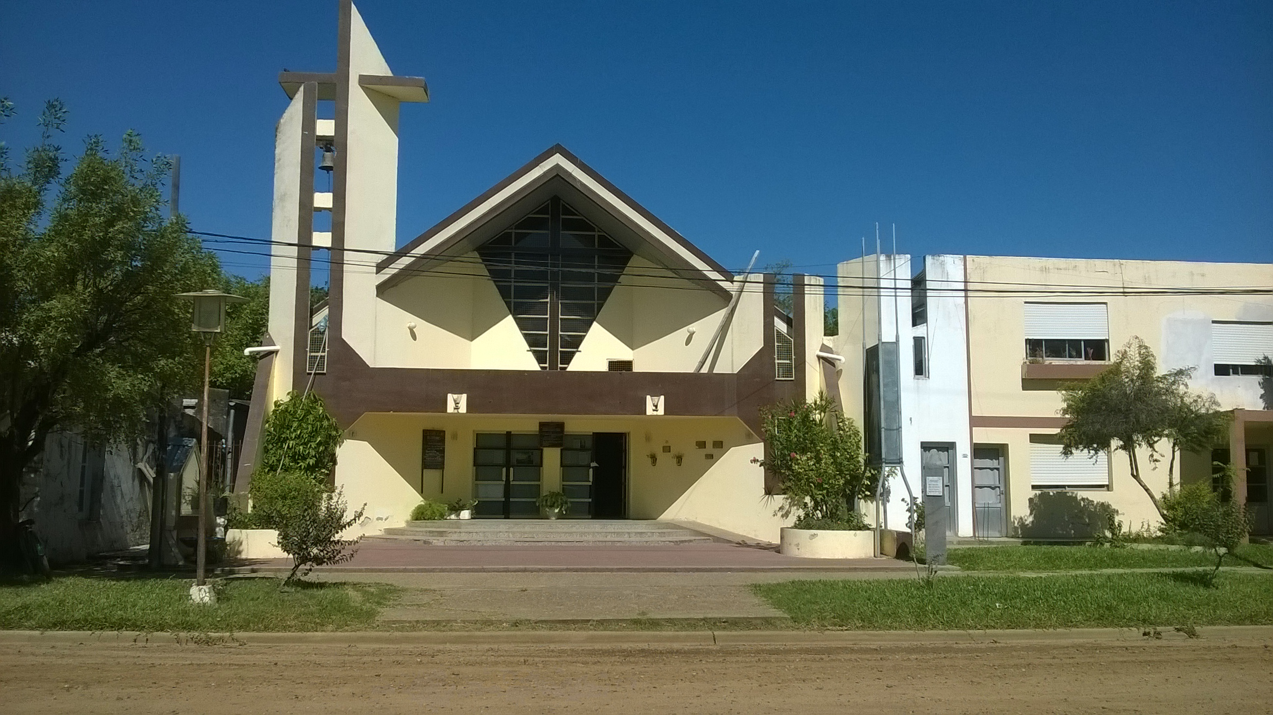 Parroquia "Sagrado Corazón de Jesús" en San Jaime de la Frontera, perteneciente a la Diócesis de Concordia.